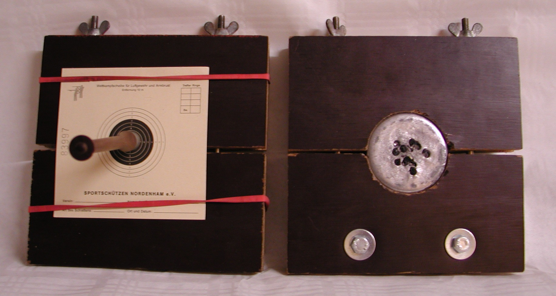 Scheibenhalte beim Armbrsutschießen Motiv: Scheibenhalter beim Armbrustschießen, links mit Schießscheibe und Armbrust-Bolzen, rechts der Bleikern, der hinter dem Ringspiegel der Schießscheibe liegt.